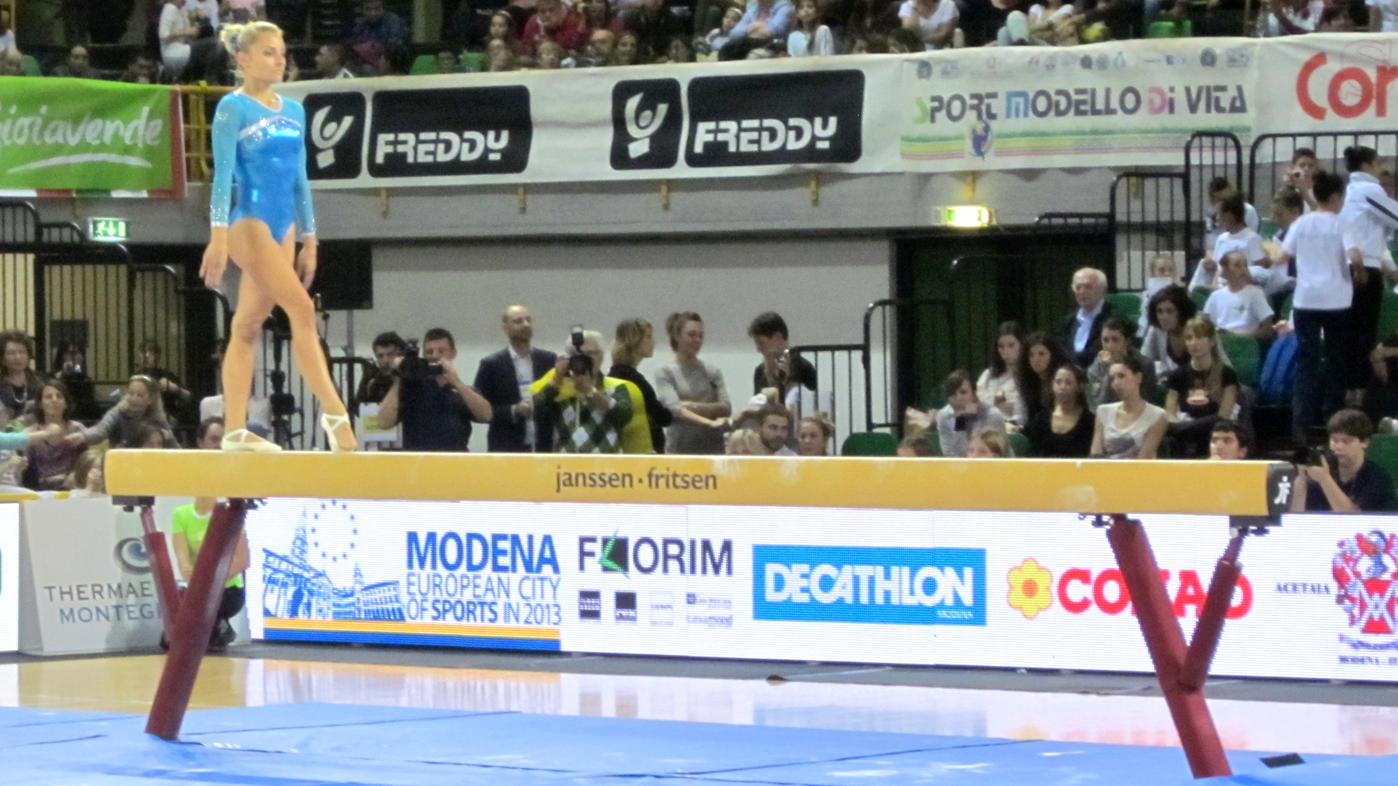 Vasiliki Millousi al Grand Prix di Ginnastica 2013